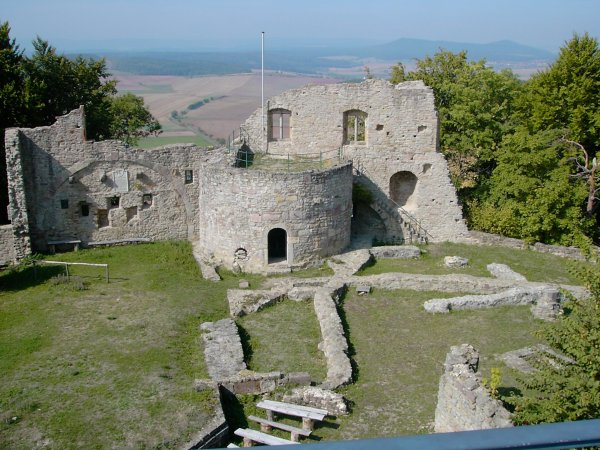 Henneburg Kernburg, eigenes Foto, public domain